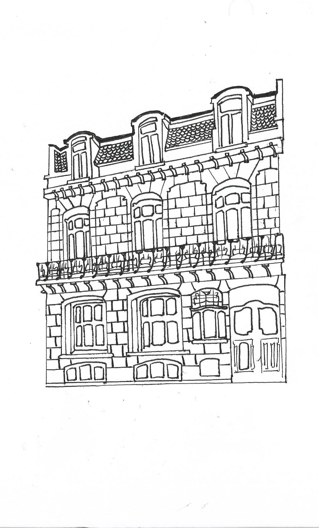 Dessin de l'hôtel Hallet